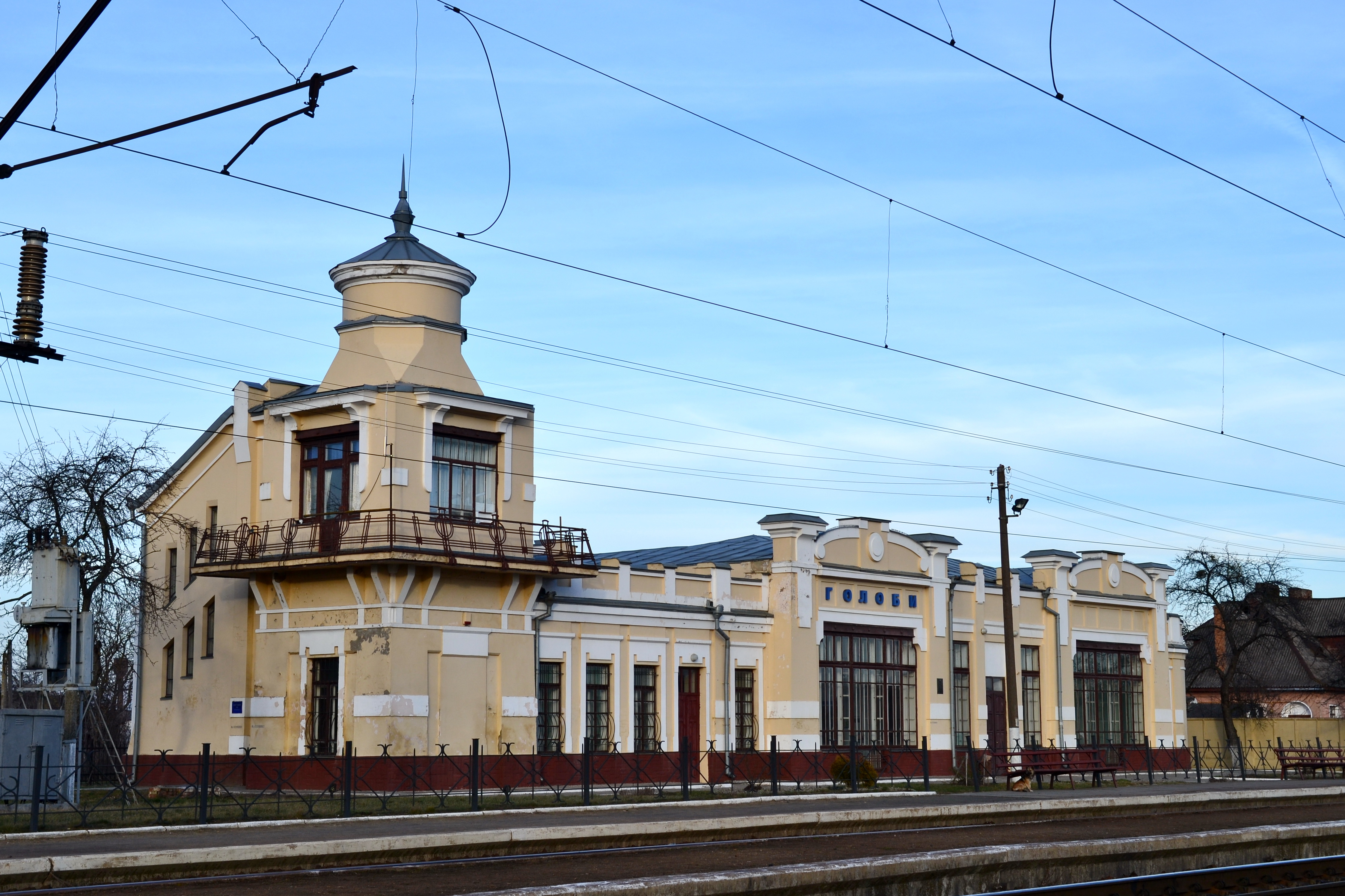 Будинок залізничної станції (мур.) (1903 рік) - вигляд з південного заходу - Голоби (вул. Вокзальна, 46а) Ковельський район Волинська область Україна